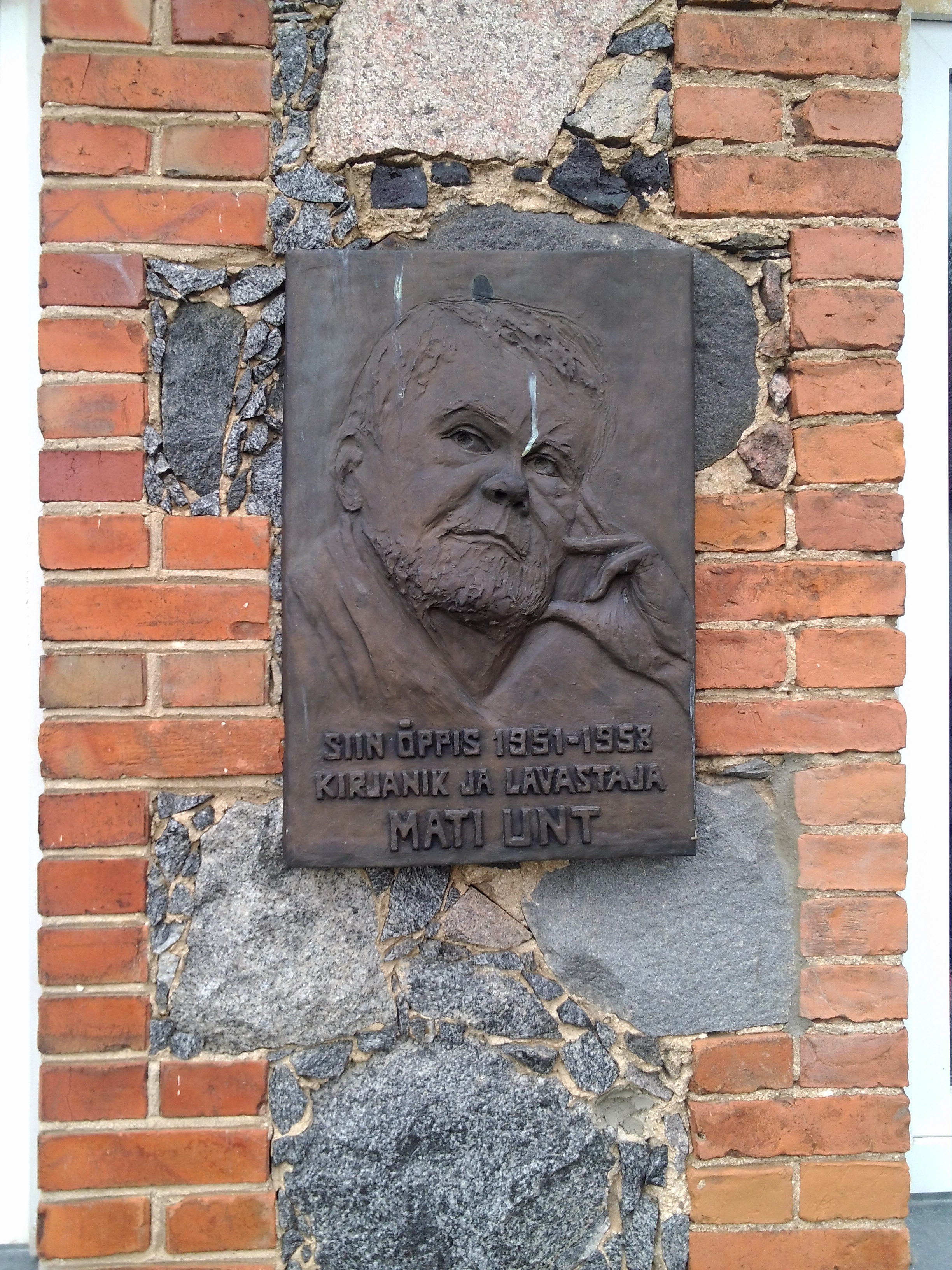 Mati Undi mälestusbareljeef Voorel